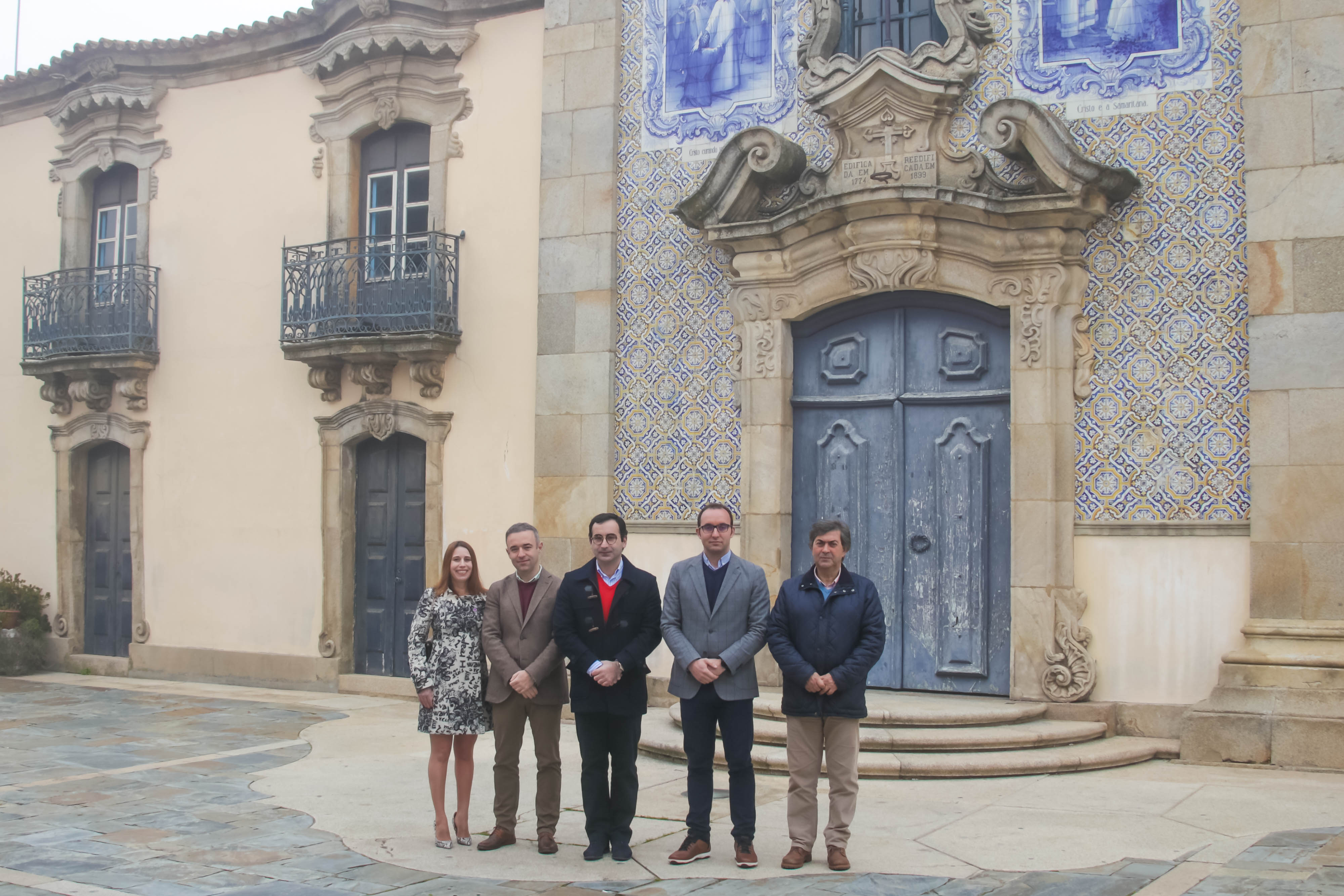 A Santa Casa da Misericórdia de S. João da Pesqueira fundada por Rui de Távora, data de 26 de maio de 1569.